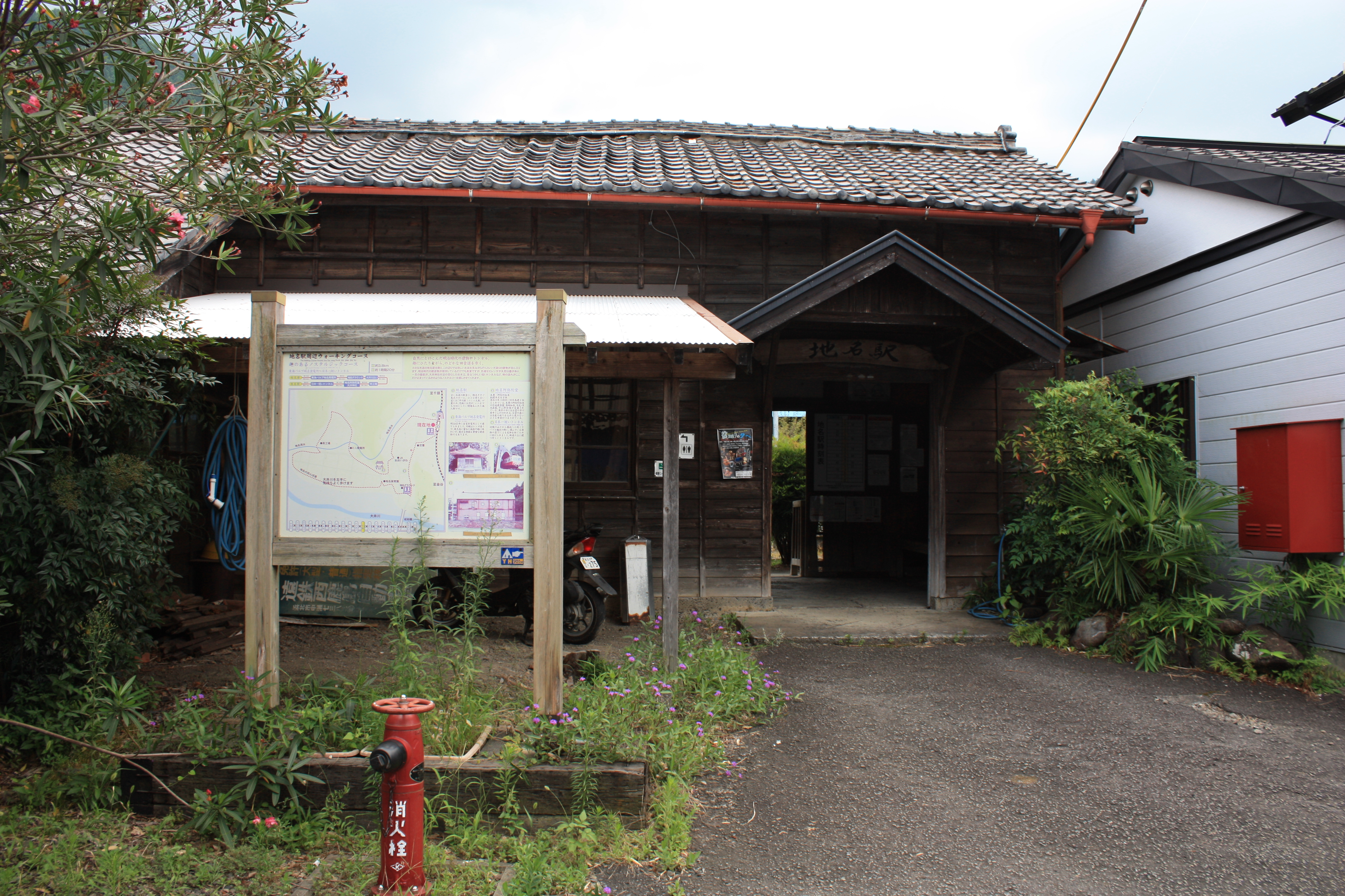 地名駅駅舎